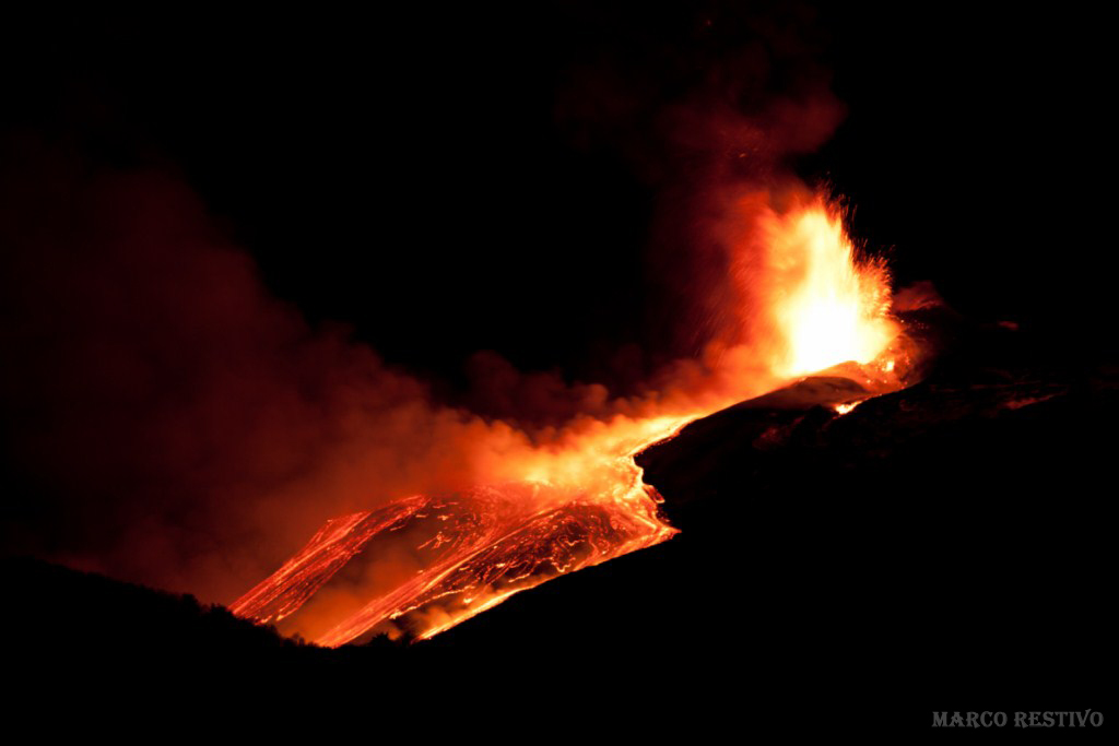 Restivo Marco